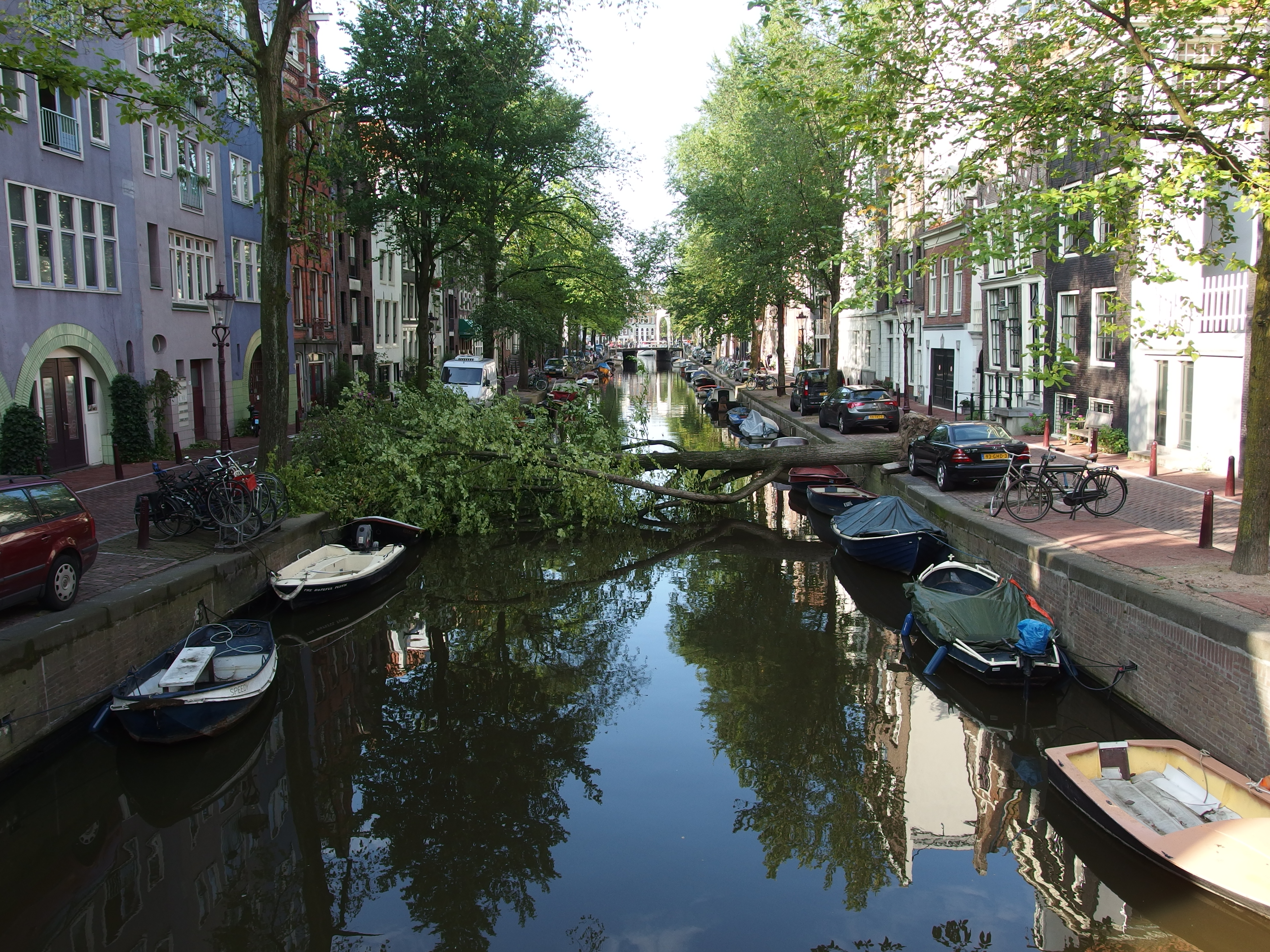 Fallen tree @ Storm aftermath @ Amsterdam